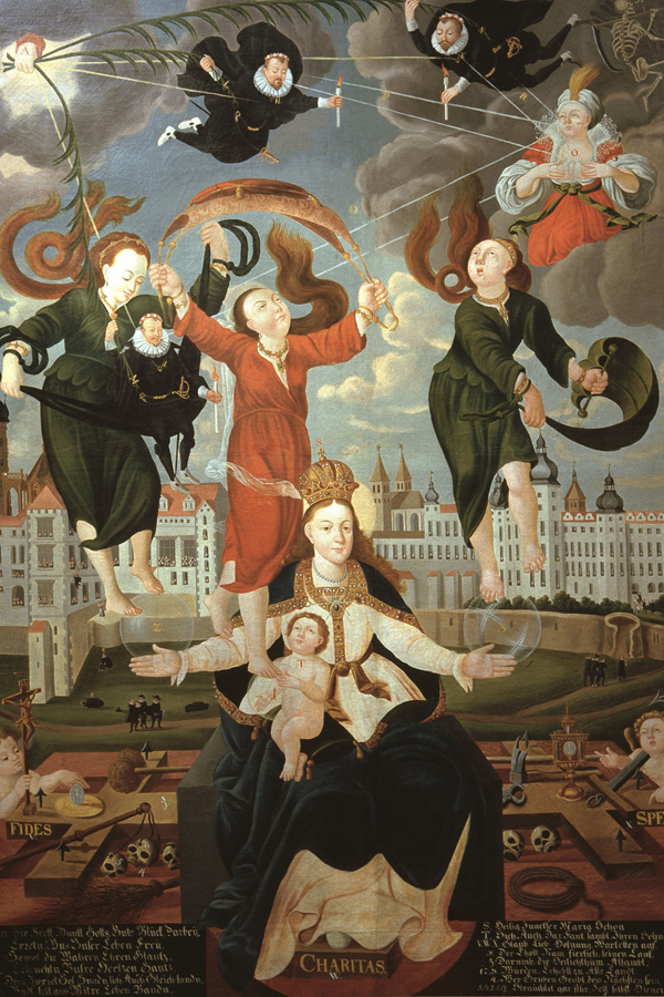 Votivní obraz Viléma Slavaty z Chlumu a Košumberka nazývaný Zázračné zachránění českých místodržících. Dnes v předpokoji na státním hradu a zámku Jindřichově Hradci.[1] Zobrazuje zázračnou záchranu obětí defenestrace roku 1618 za pomoci Panny Marie.